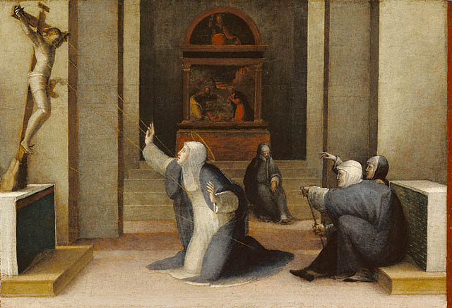 Beccafumi, stimmate di s. caterina